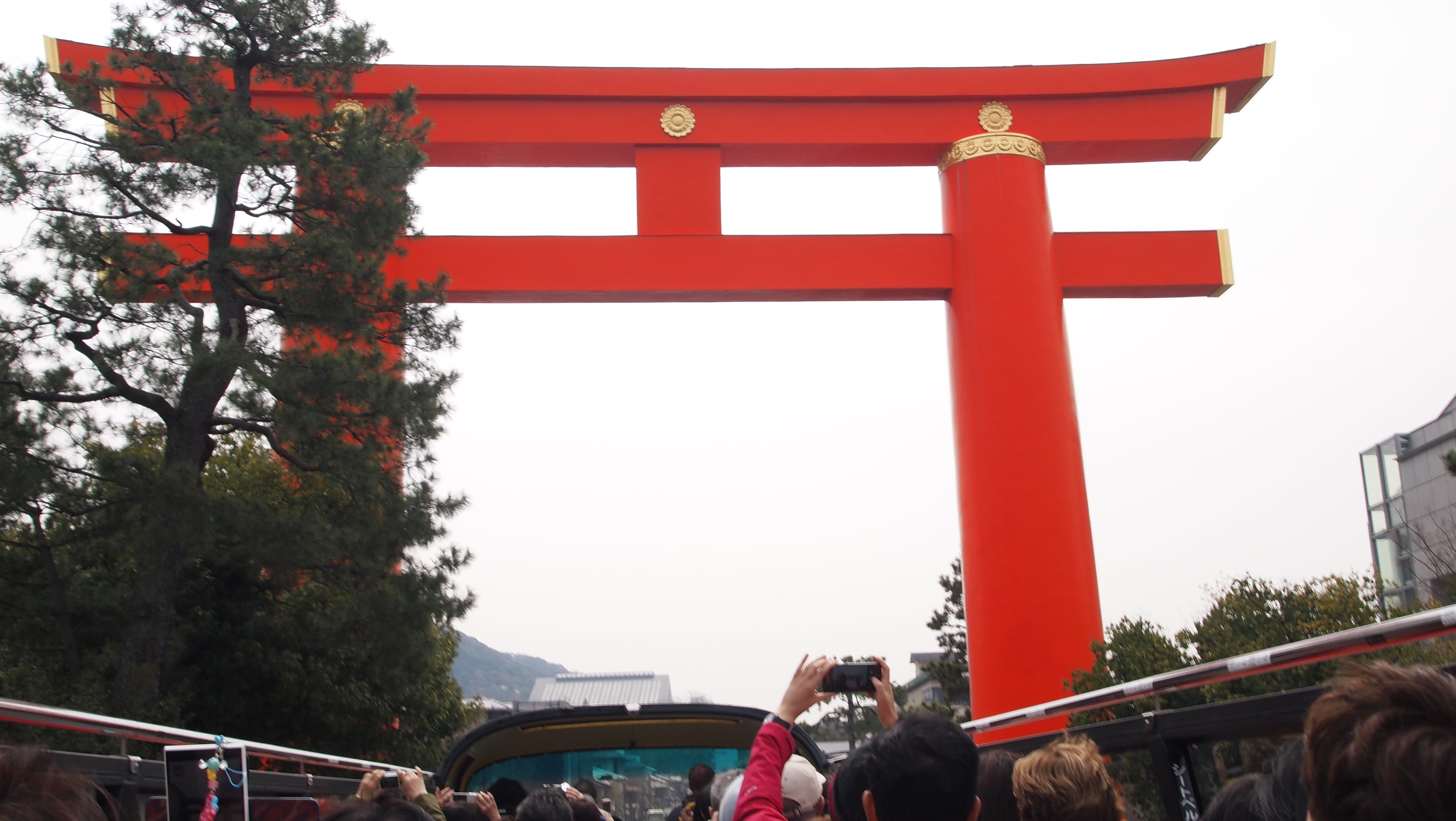 平安神宮大鳥居とスカイバス